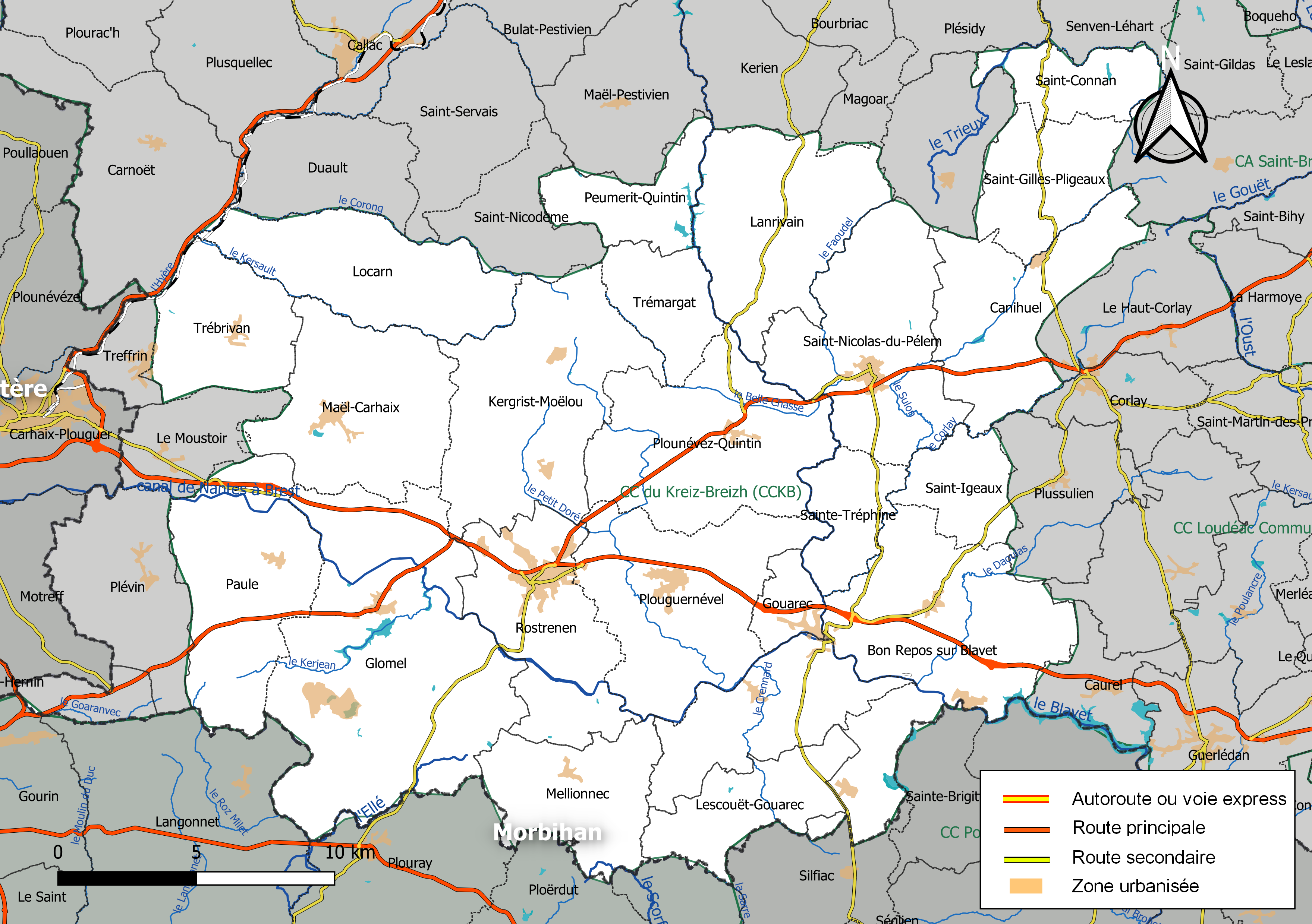 Carte géographique de la Communauté de communes du Kreiz-Breizh, département des Côtes-d'Armor, France. Composition au 1er janvier 2019.